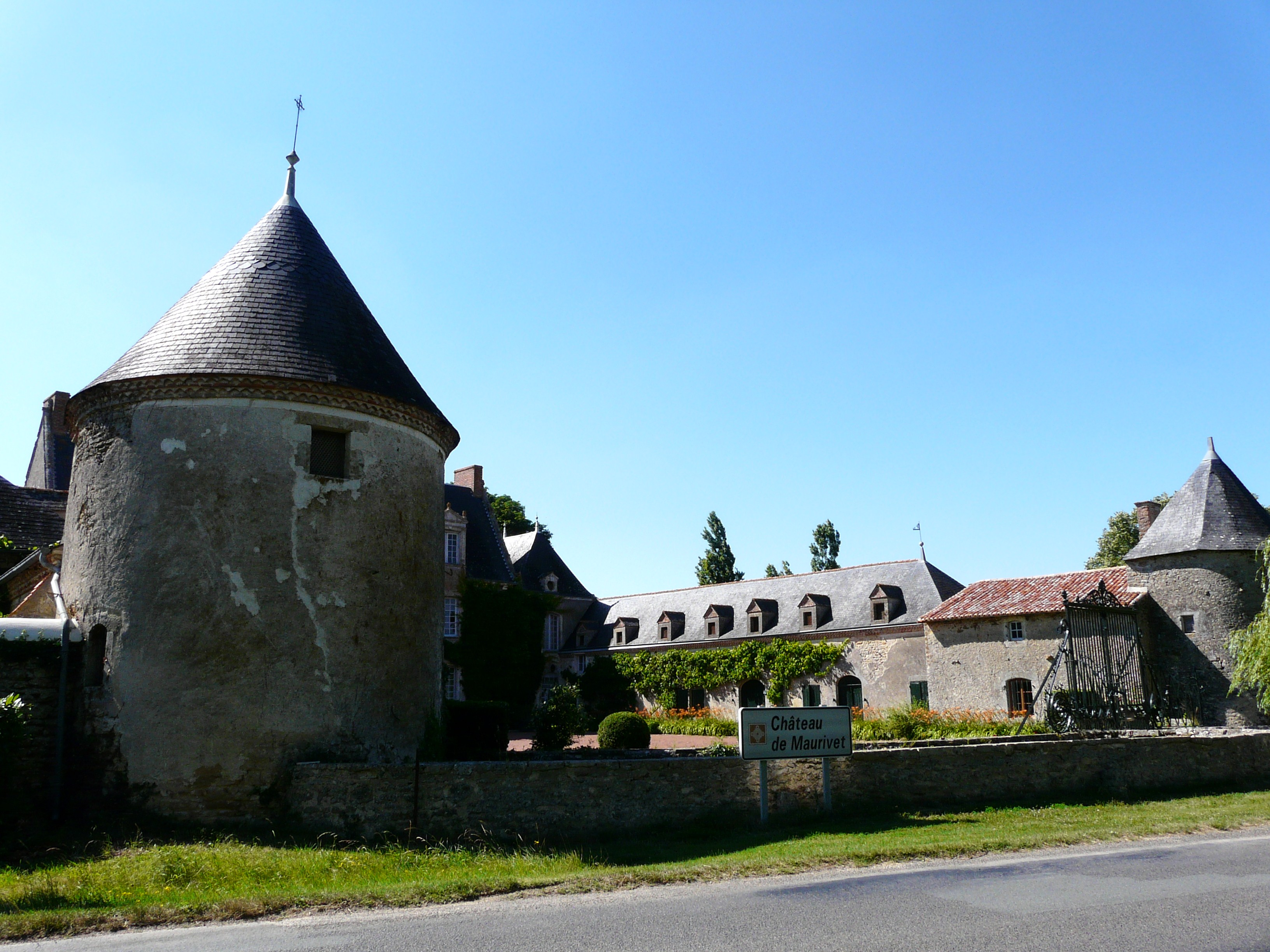 Le château de Maurivet, Oroux, Deux-Sèvres, France